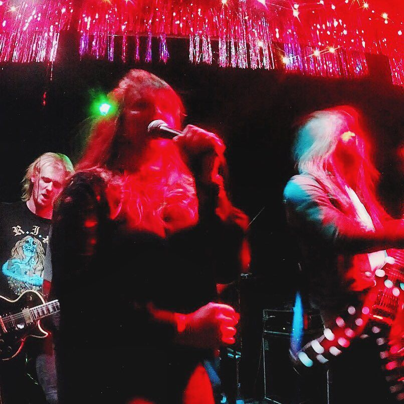 via Instagram ift.tt/1QbSZVp